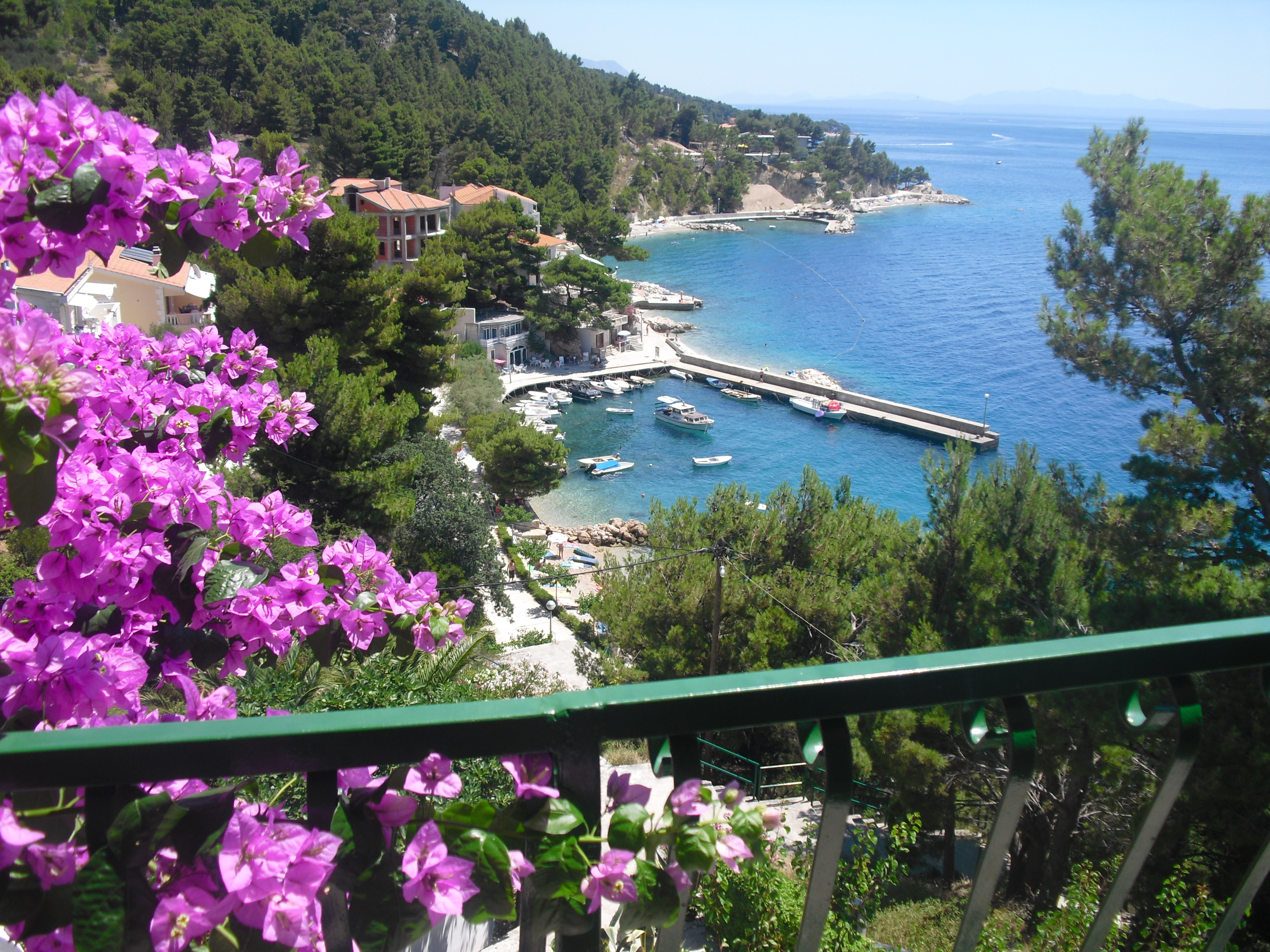 Prímorská obec Brela, časť Stomarica.Jadranské more